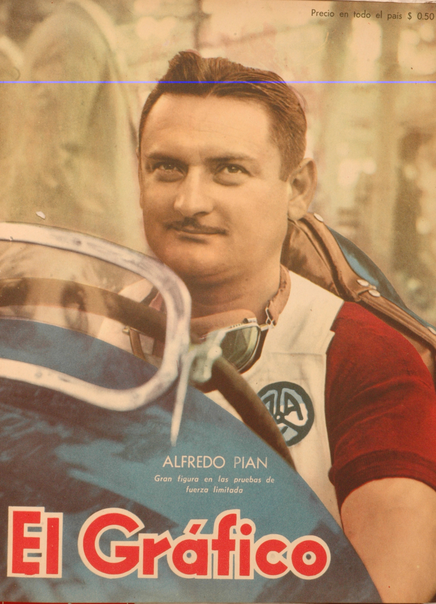 El Grafico del 30 de Septiembre de 1949. Edicion 1573